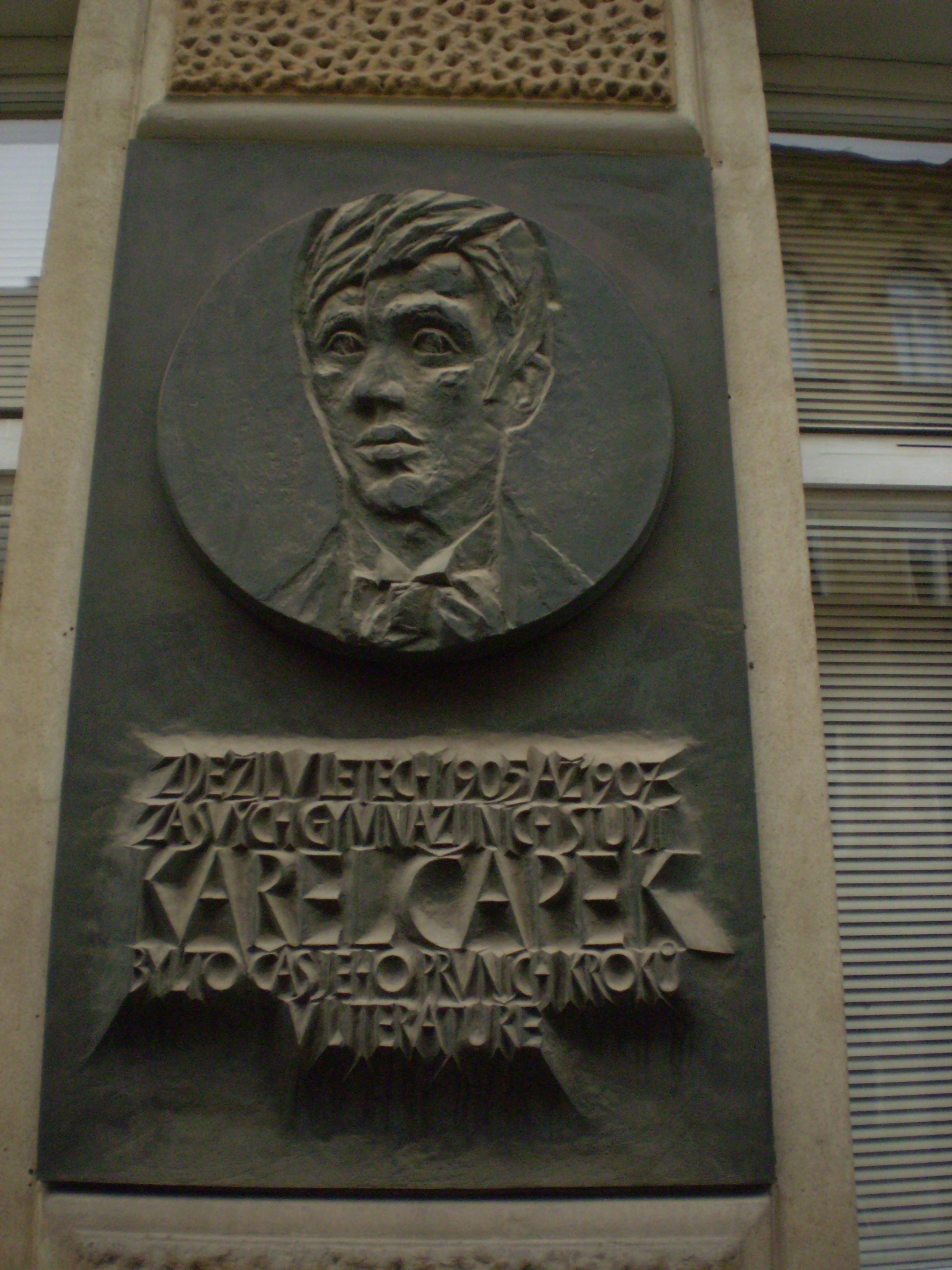 Pamětní deska v Brně v Jaselské ulici, která na jednom z domů připomíná místo, kde žil Karel Čapek